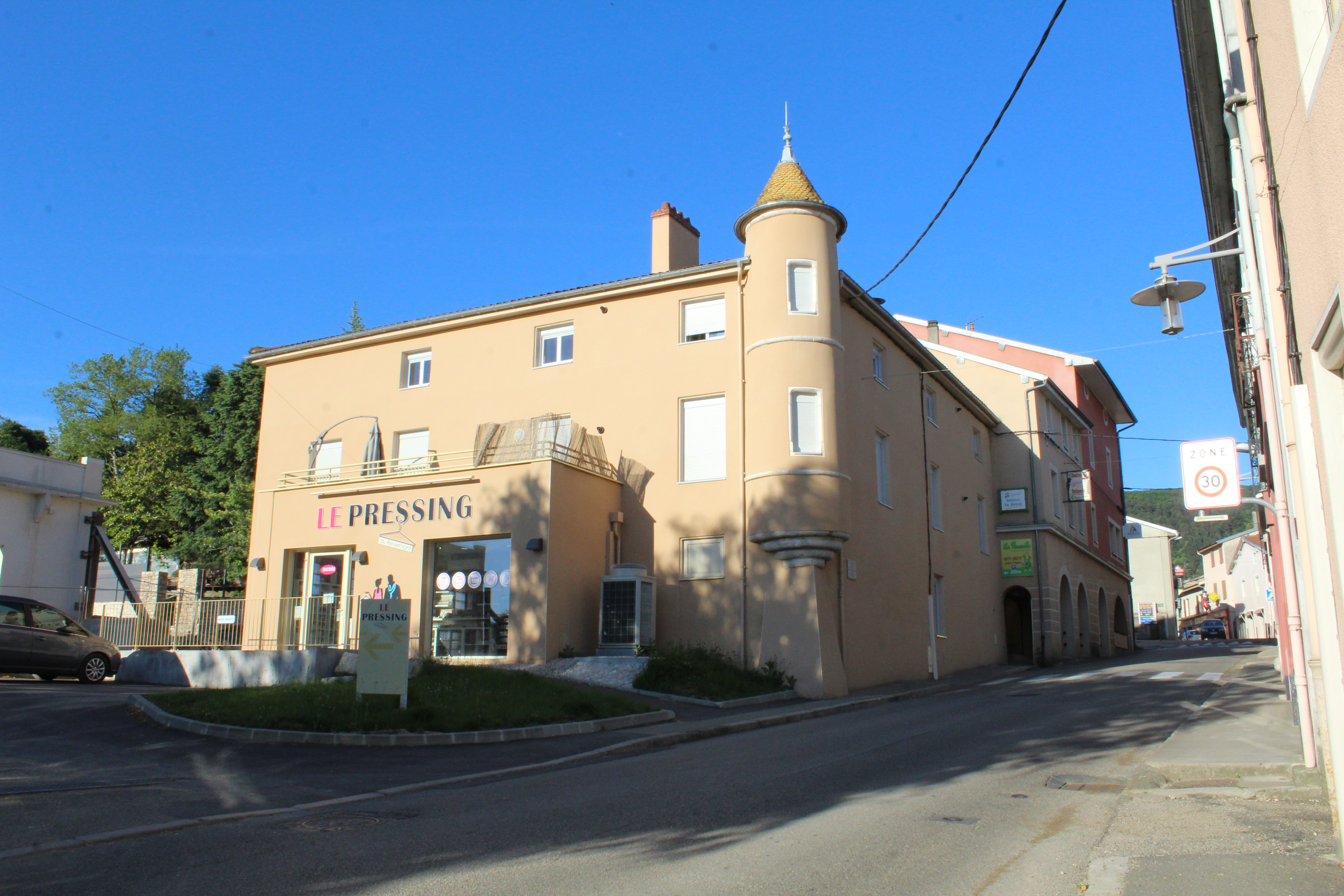 Maison Guillon, demeure où ont vécu Joseph de Lalande et Samuel Guichenon. Bâtiment situé à Ceyzériat.